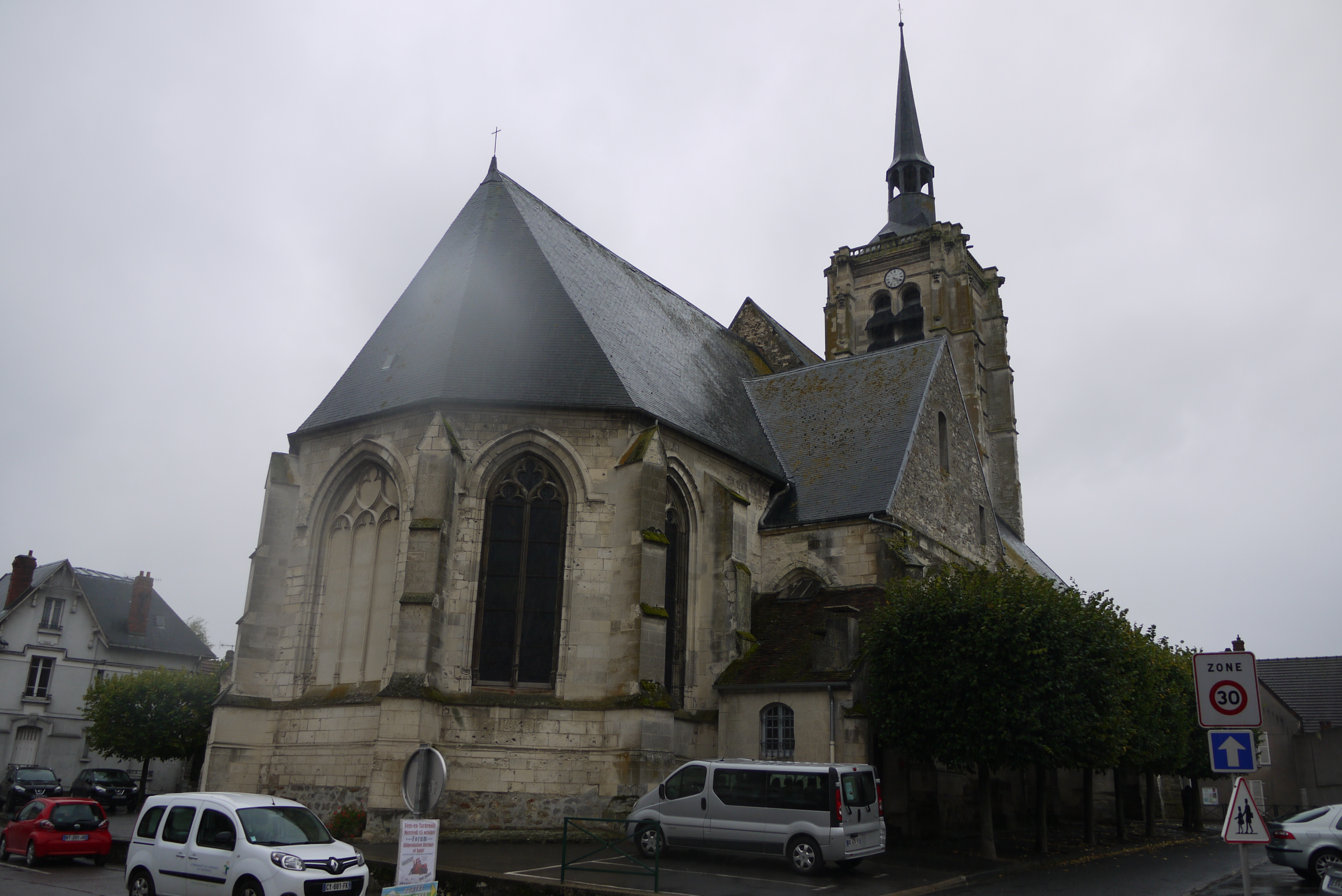 Église Saint-Macre de Fère-en-Tardenois.